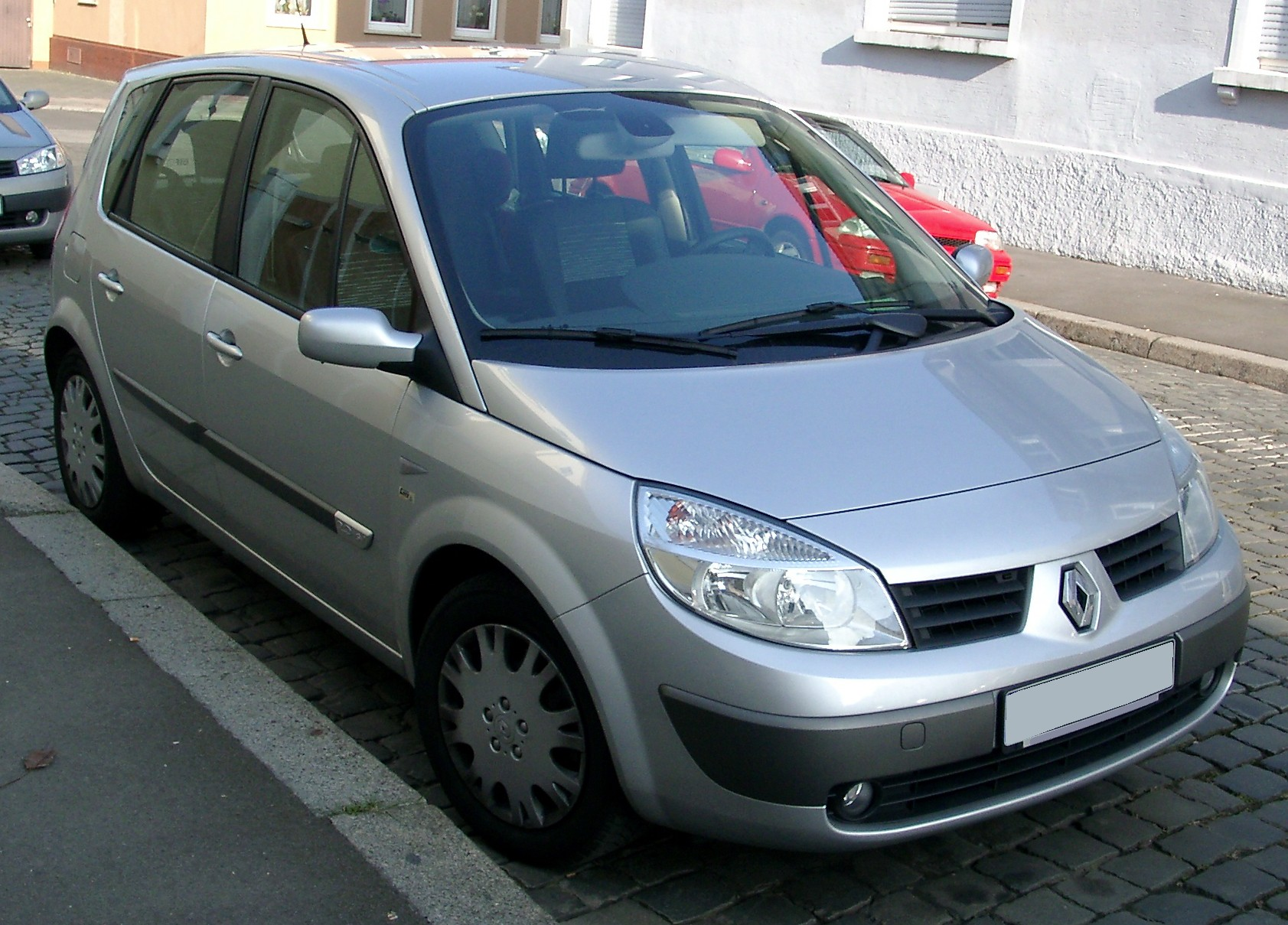 Renault Scénic, 2. Generation